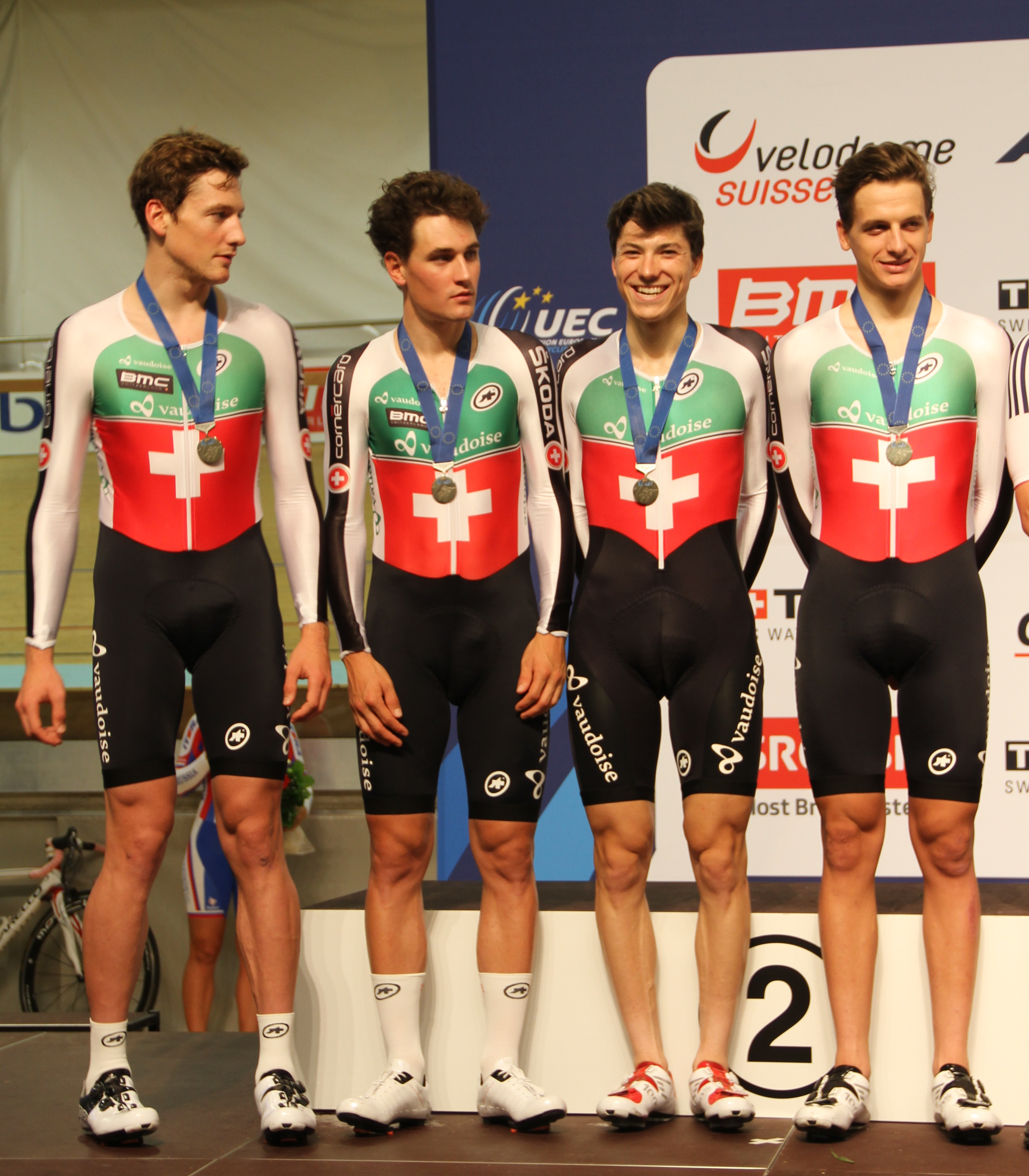 Schweizer Bahn-Vierer der Männer, v.l.n.r.: Stefan Küng, Silvan Dillier, Frank Pasche, Théry Schir The making of this document was supported by the Community-Budget of Wikimedia Germany.